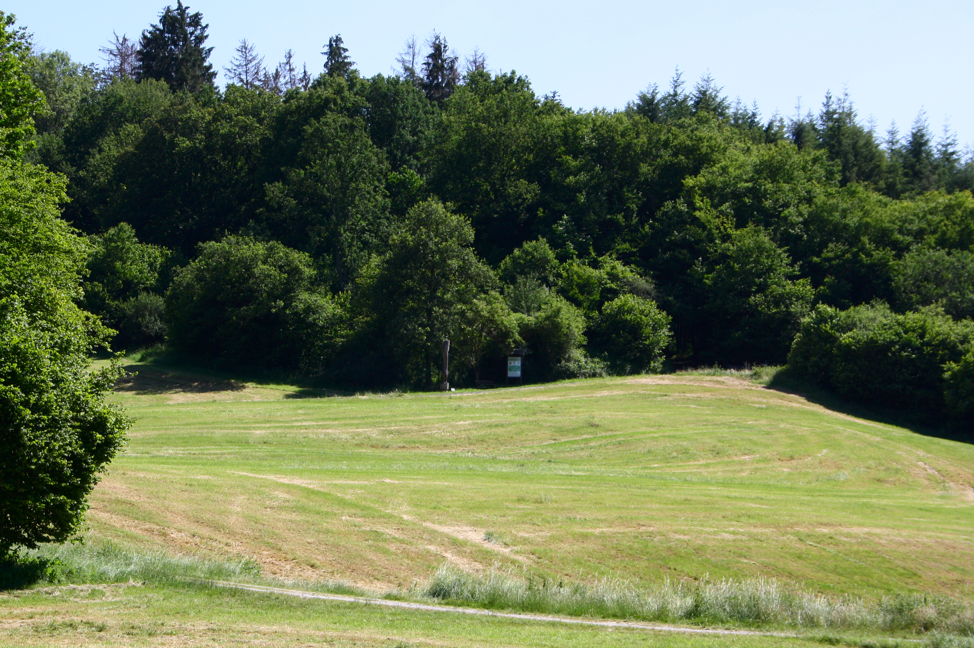 Wüstung Sespenroth, Heilberscheid, Westerwald, Rheinland-Pfalz, Deutschland